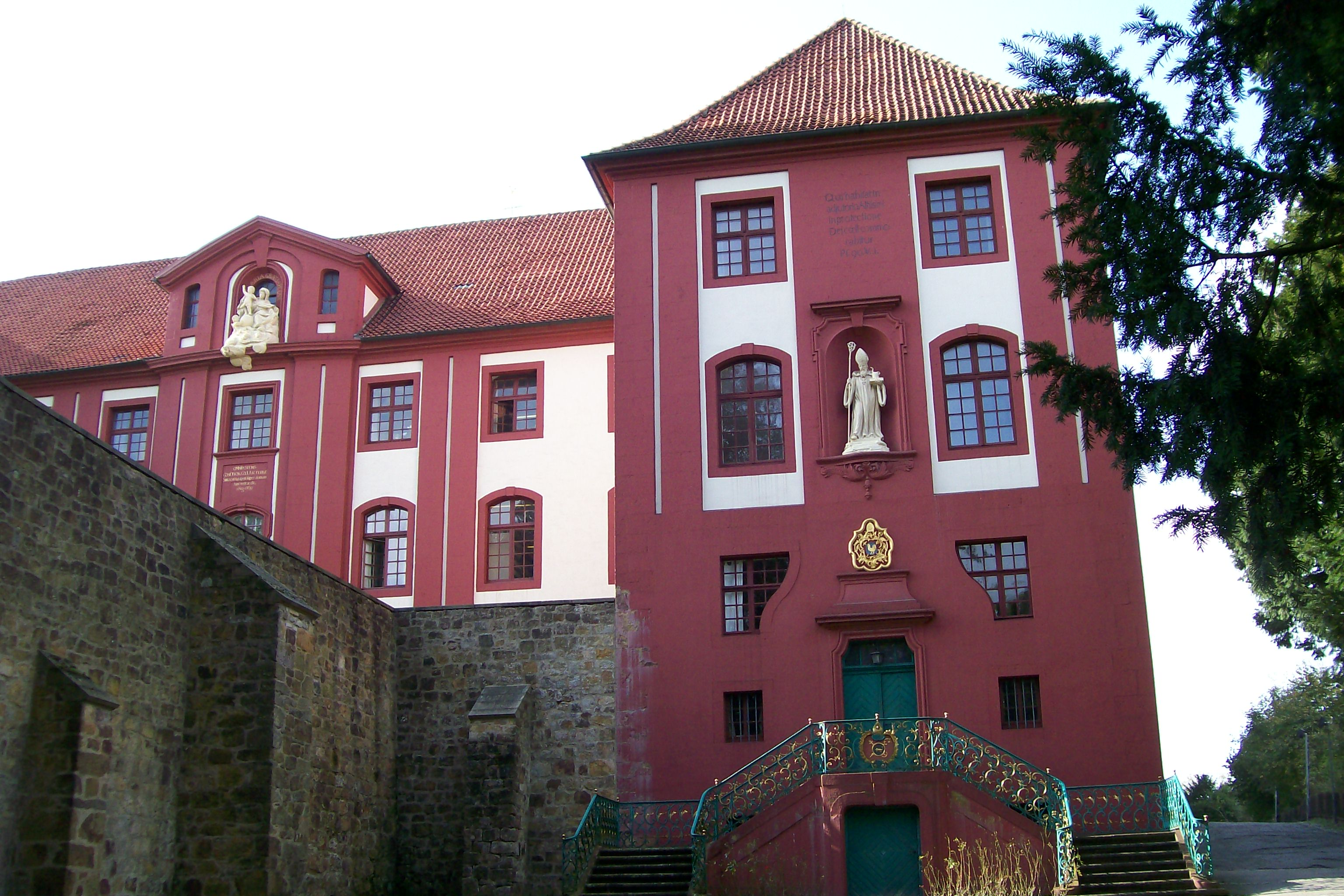 Schloss und Benediktinerabtei Iburg in Bad Iburg, Schlaunscher Klostertrakt